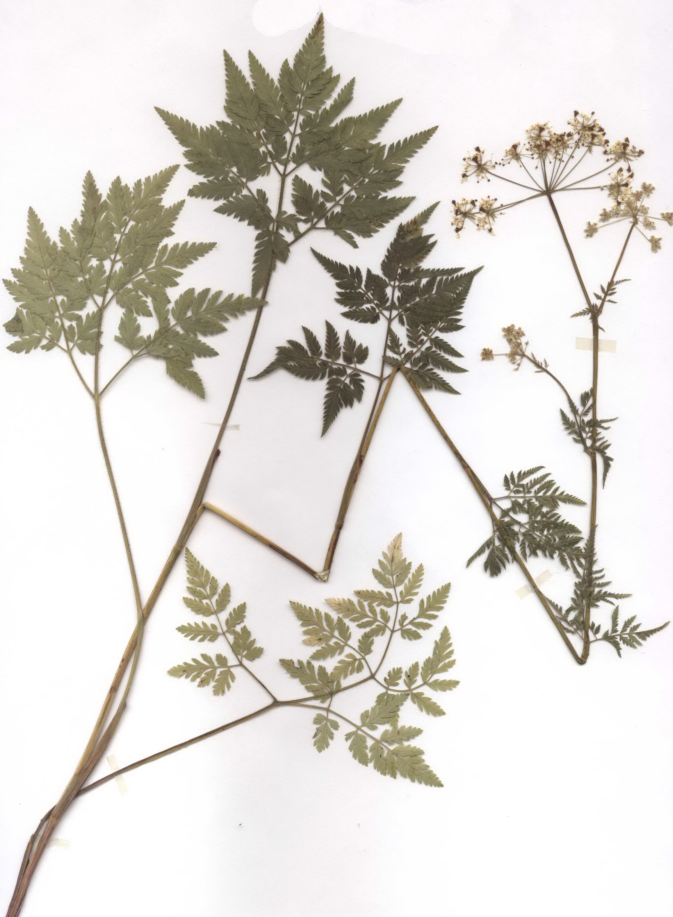 Chaerophyllum aureum, eigener Herbarbeleg von 1987, Unterfranken